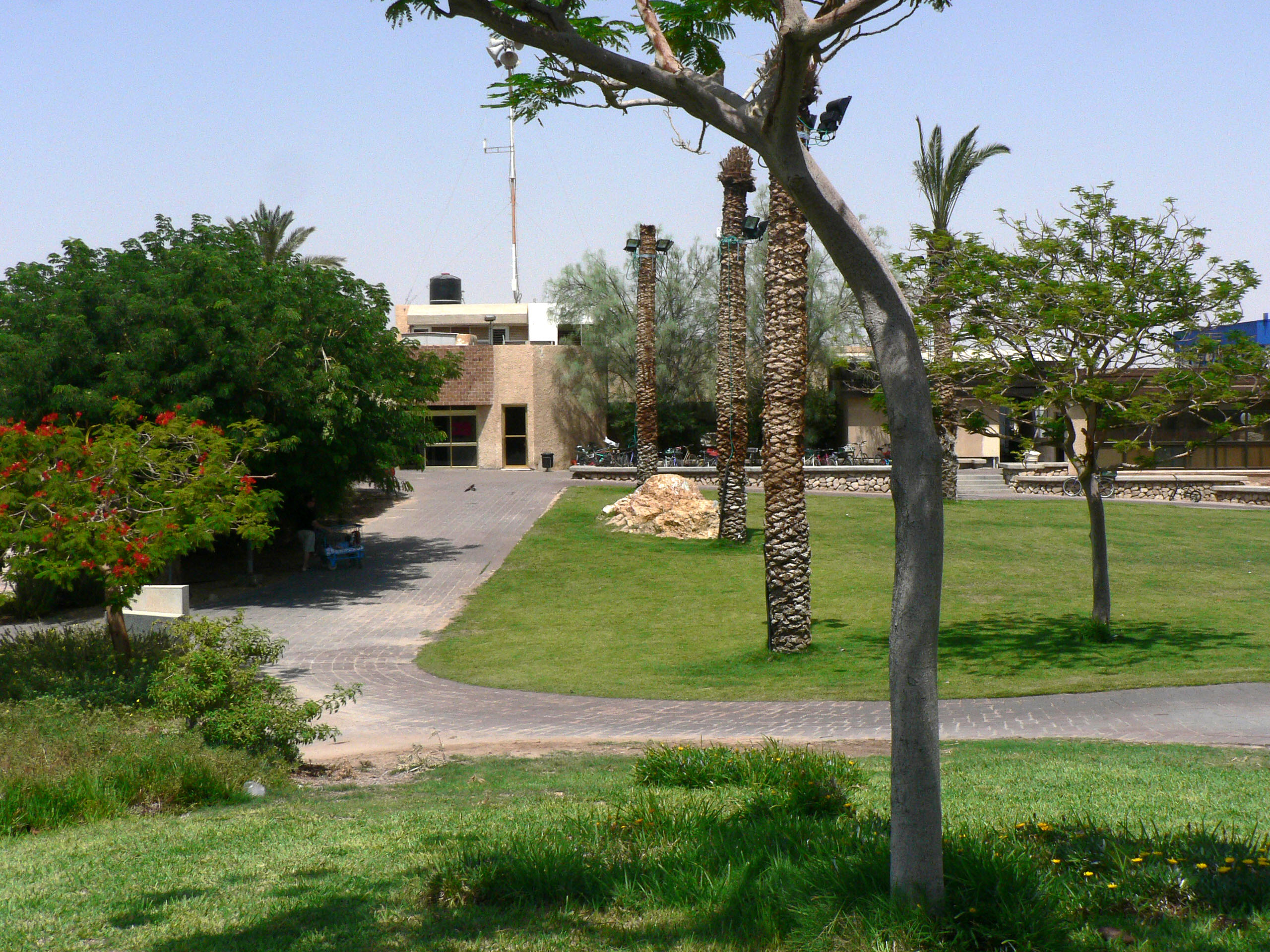 Yotvata, Israel קיבוץ יטבתה